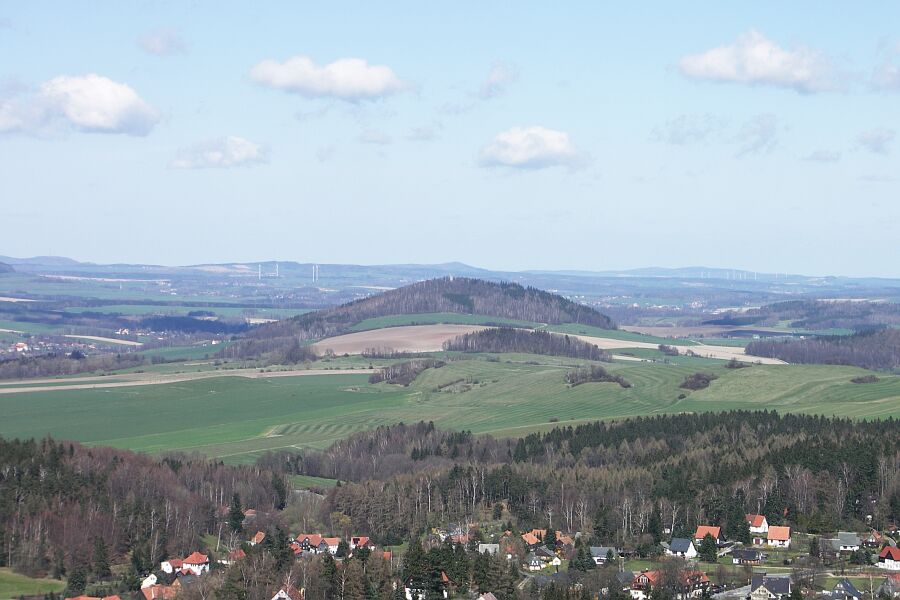 Breiteberg, Saxony, Germany